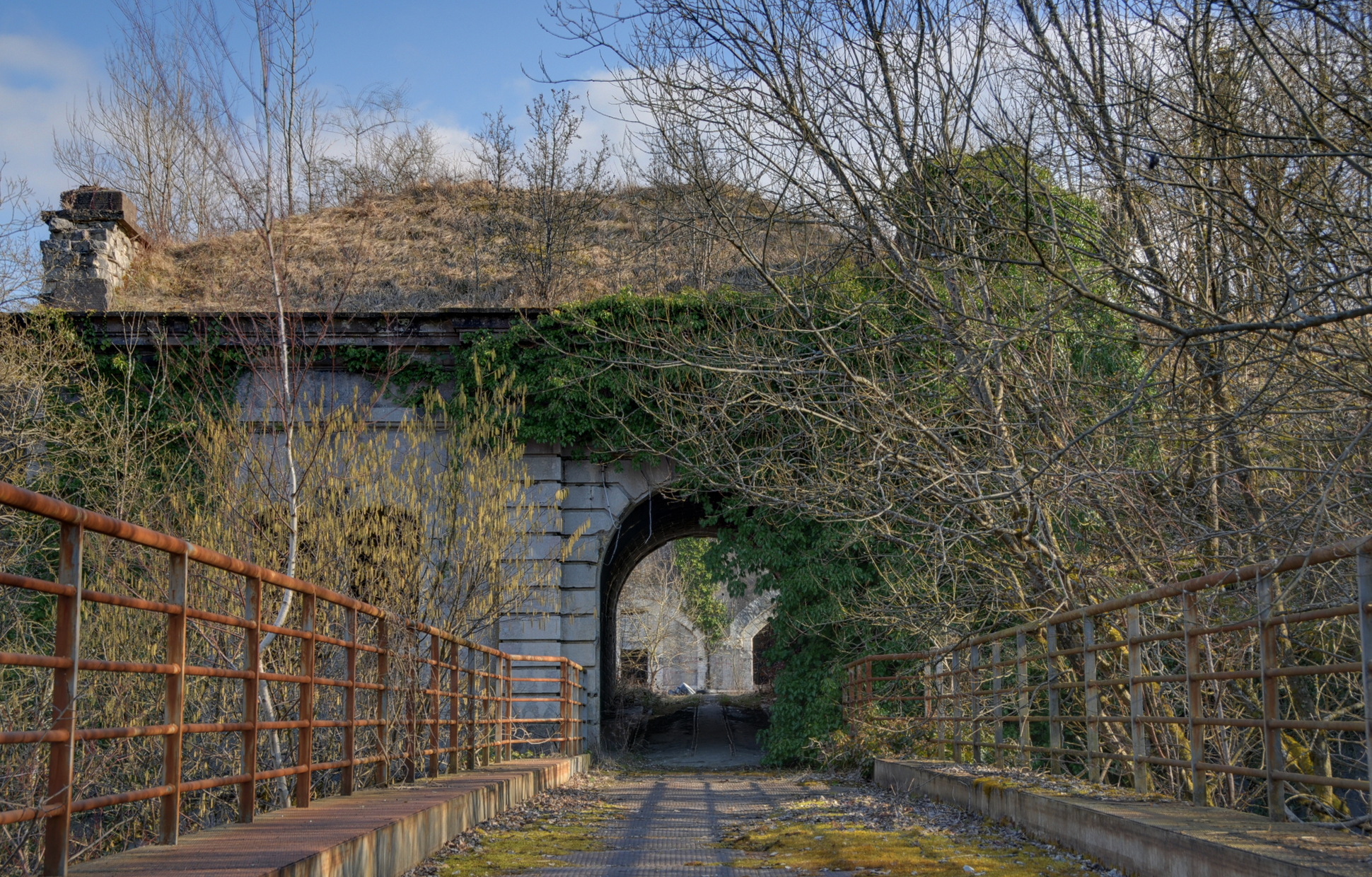 Bois d'Oye fortifications (HDR).